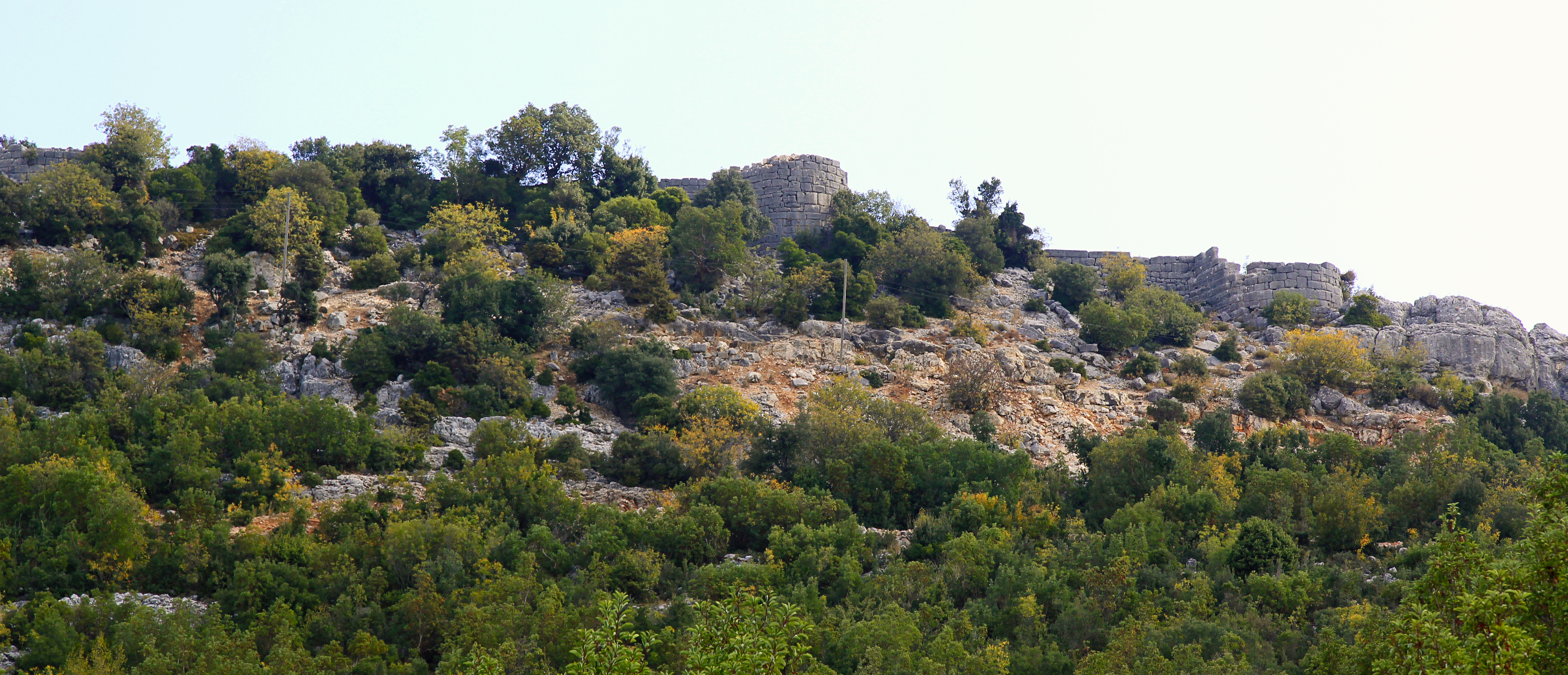 Yeniyurt, hellenistischer Festungsbau nördlich von Erdemli im Rauhen Kilikien, Südtürkei